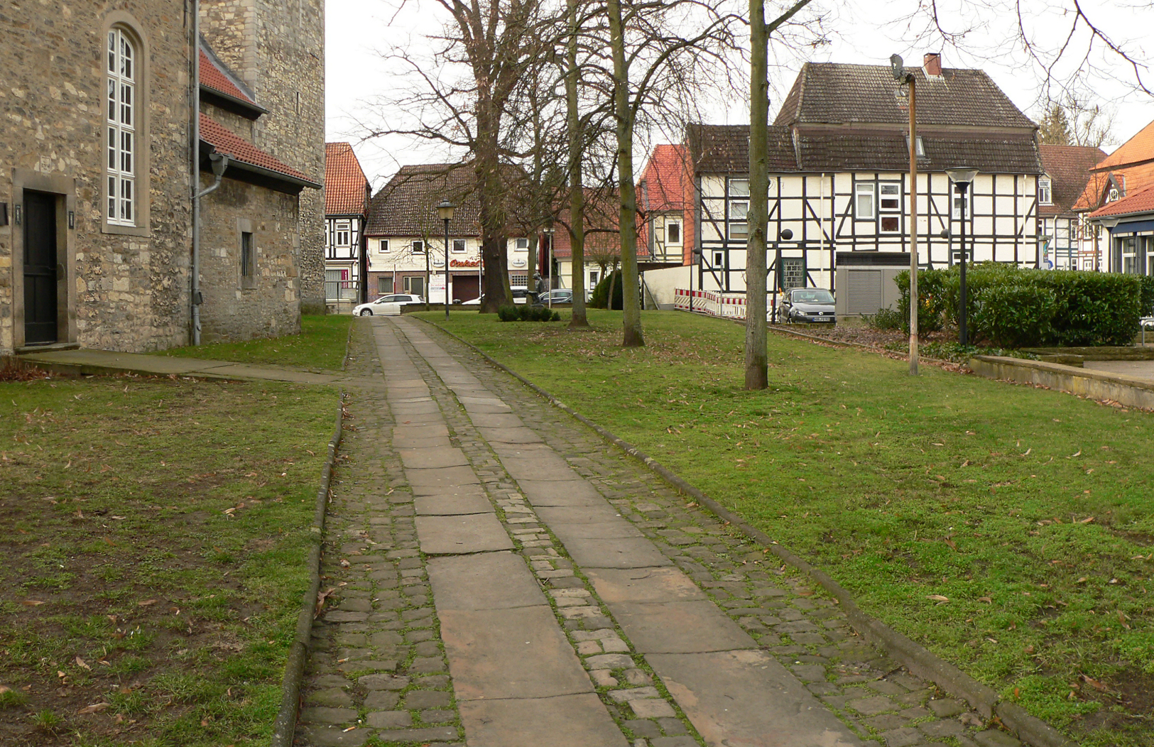 St. Petrus-Kirche Vorsfelde, Gehweg und Rasen mit Kirchhof